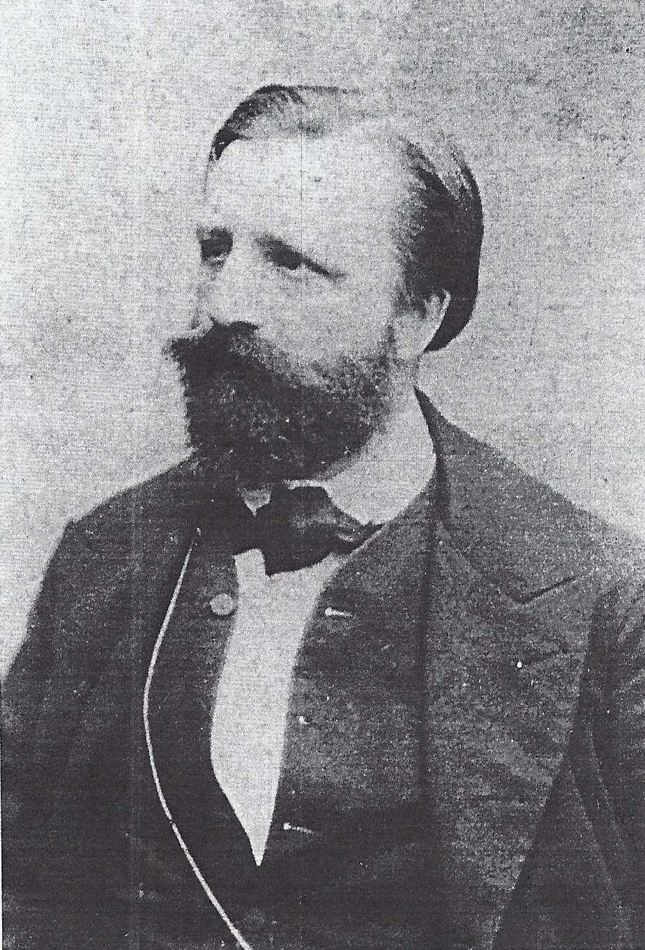 Porträtfotografie von Ludwig Aegidi (1825-1901)